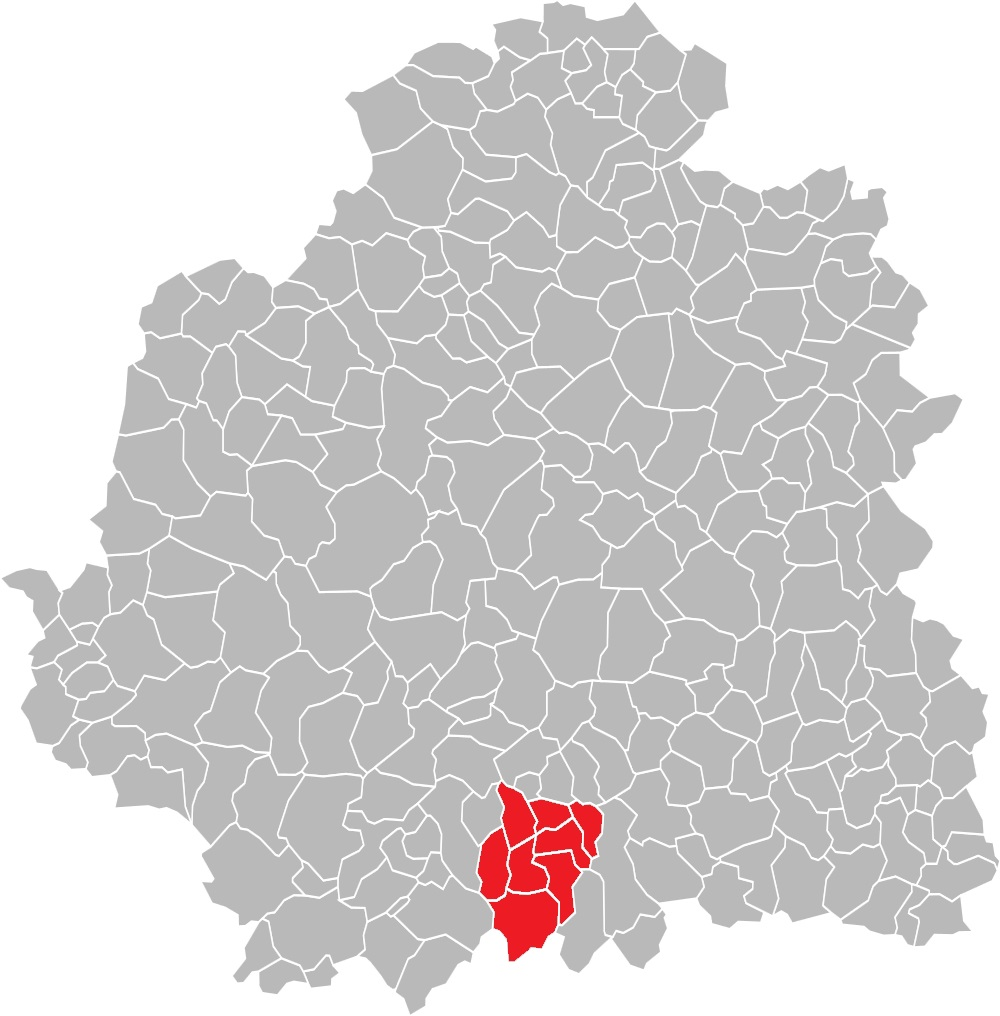 Carte des communes de l'Indre (36) : Le canton d'Éguzon-Chantôme, de 1790 à 2015.